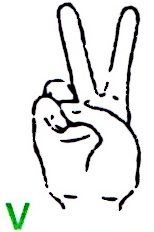 Der Buchstabe V im deutschen Fingeralphabet, entsprechend einer Infokarte des Landesverbandes Bayern der Gehörlosen e.V. (